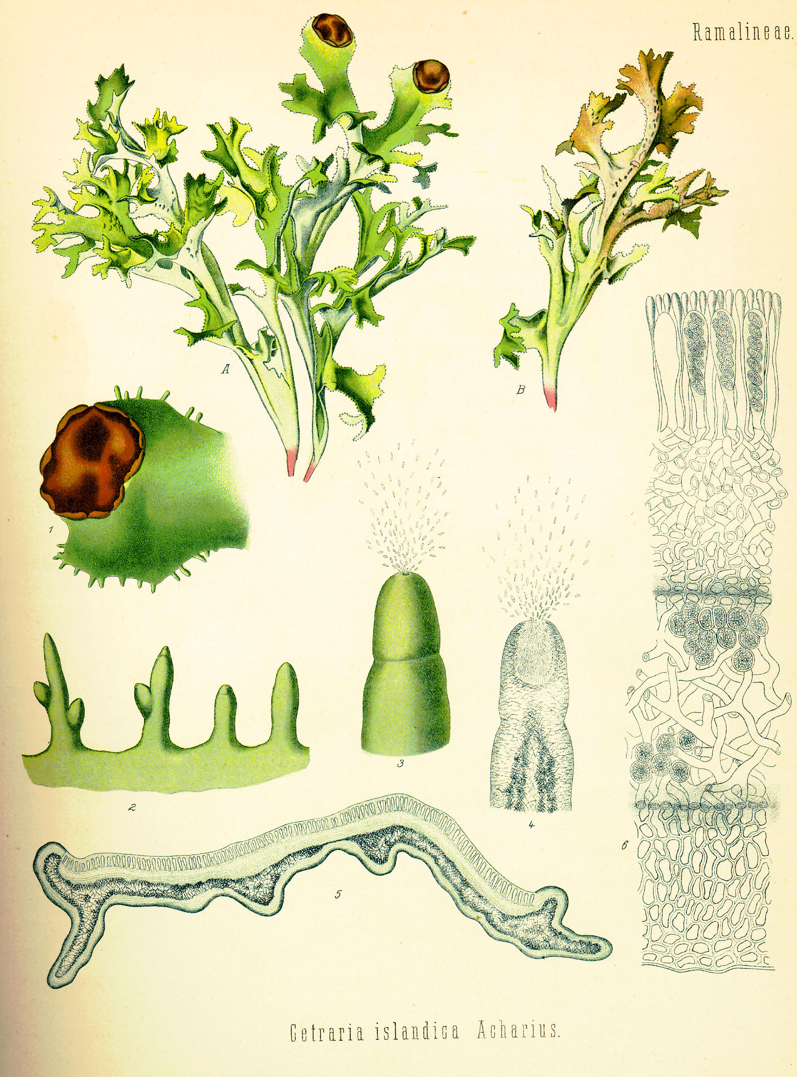 Planche botanique n° I-71 de l'"Atlas des Plantes médicinales de Köhler en images réalistes avec brèves notes explicatives".